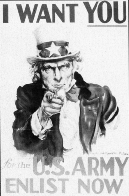 I want you